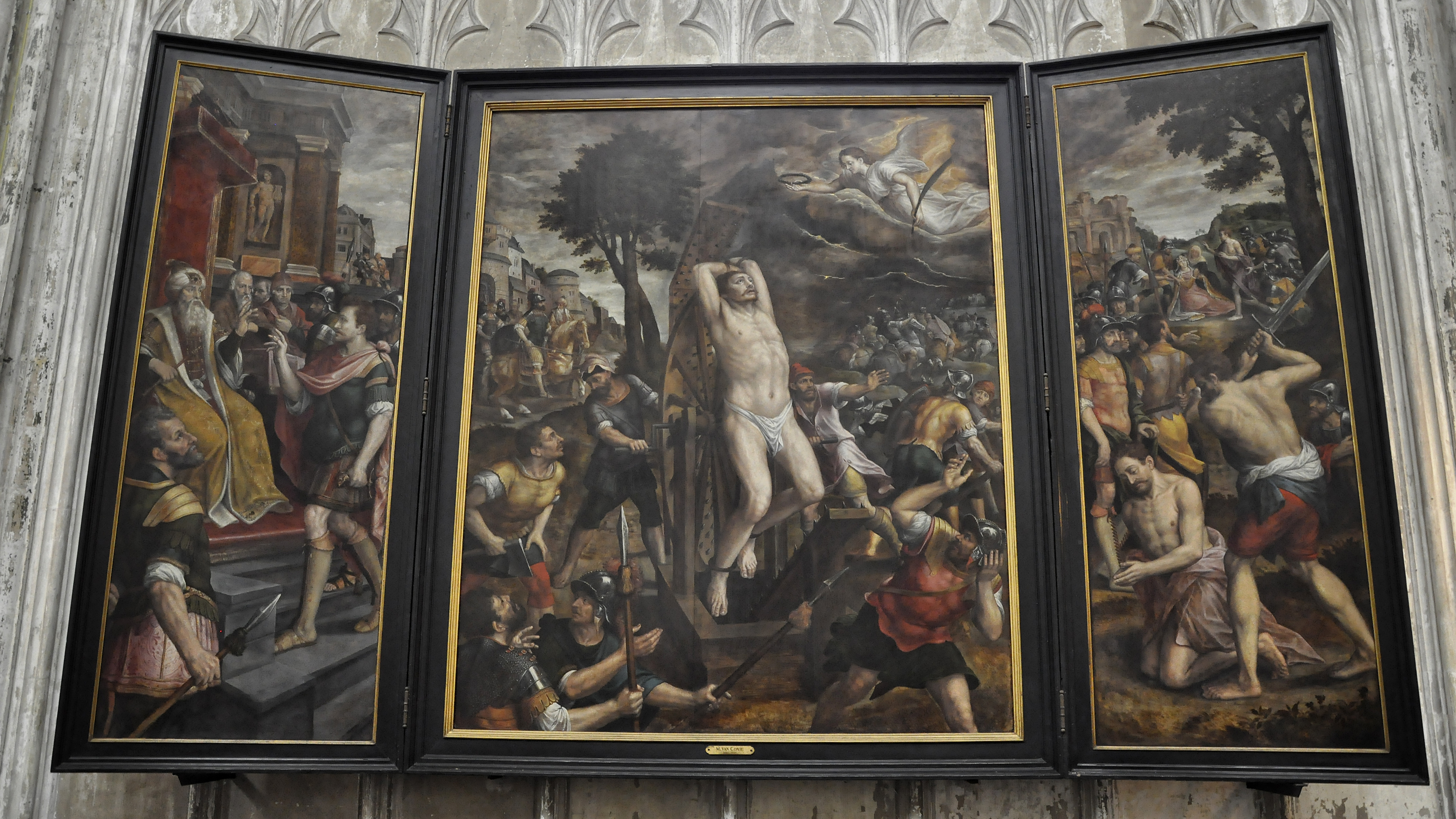 Michiel Coxie (1499-1592) - De marteling van Sint-Joris (Sint-Joris voor de rechter en onthoofding van Sint-Joris) (1588) - Mechelen Sint-Romboutskathedraal - 9-06-2012